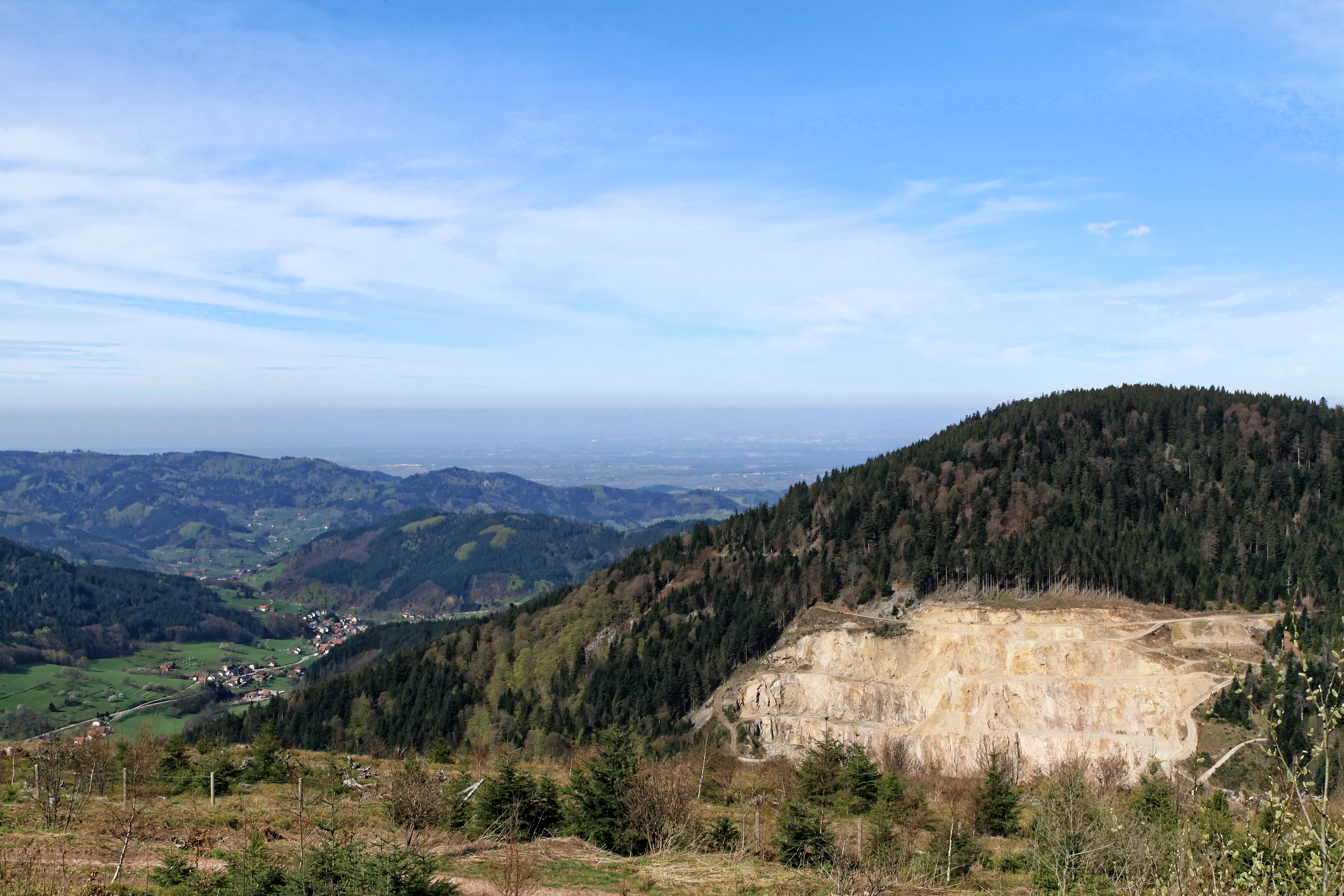 Blick von der Schwarzwaldhochstraße in Seebach (Baden) hinunter auf Seebach (Baden)